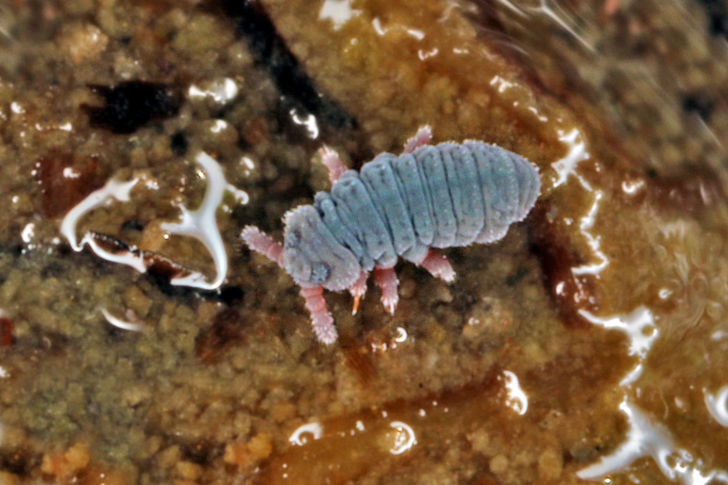 Trouvés dans une zone humide (Alt. 1630 m - Pyrénées ariégeoises)